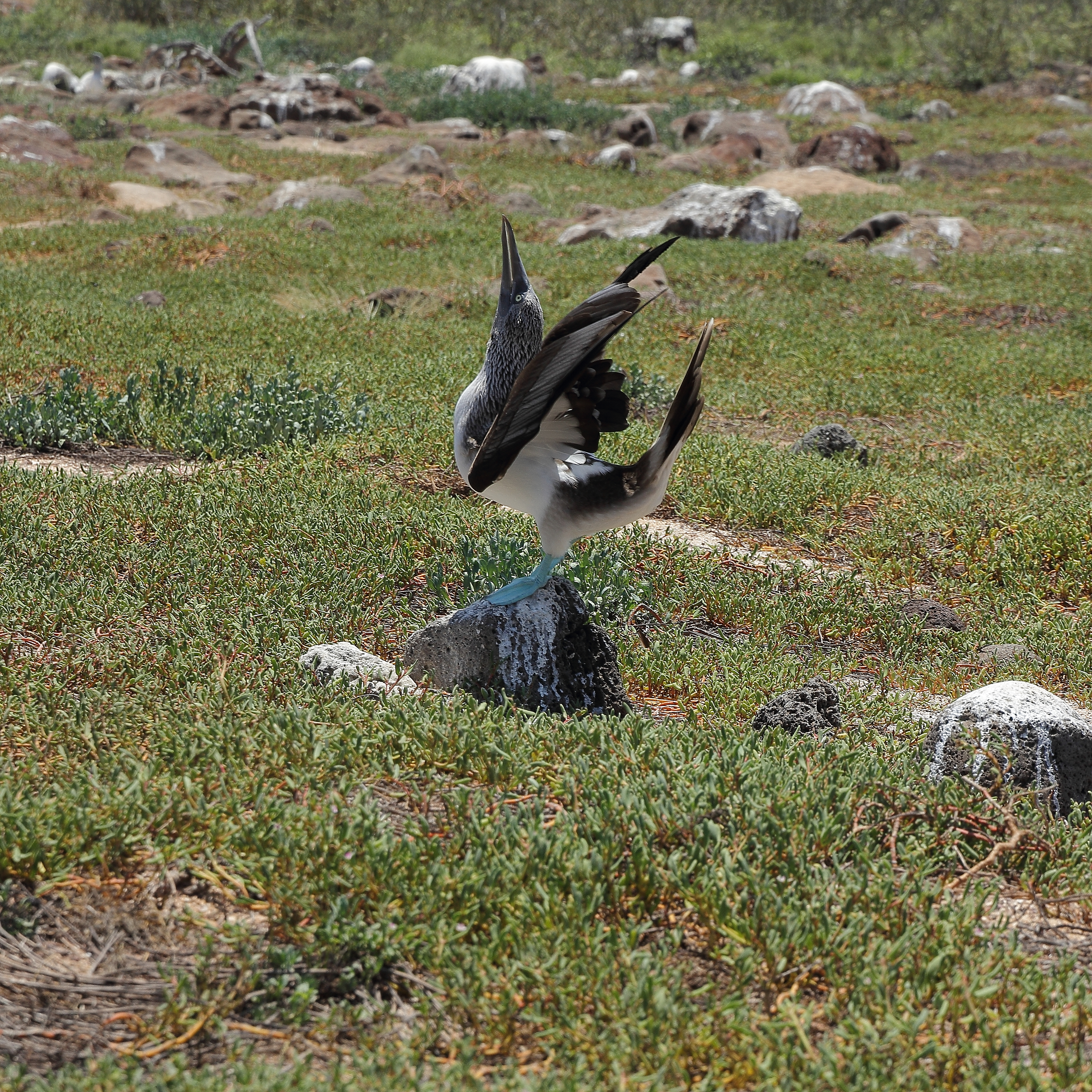 Sula nebouxii på Seymour Norte, Galápagosöarna.